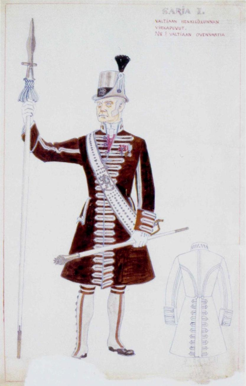 Taiteilija Akseli Gallen-Kallelan luonnos "Suomen valtiaan" ovenvartijan virkapuvuksi.